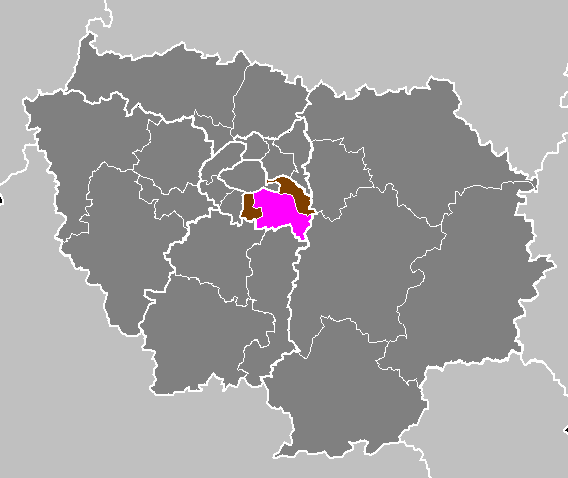 Maps of arrondissements and cantons of France: Département du Val-de-Marne - Arrondissement de Créteil.PNG (Région Île-de-France)